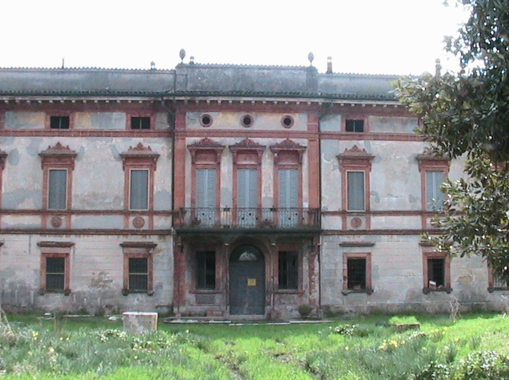 Pieve Gurata (Cingia de' Botti) - Antico Palazzo